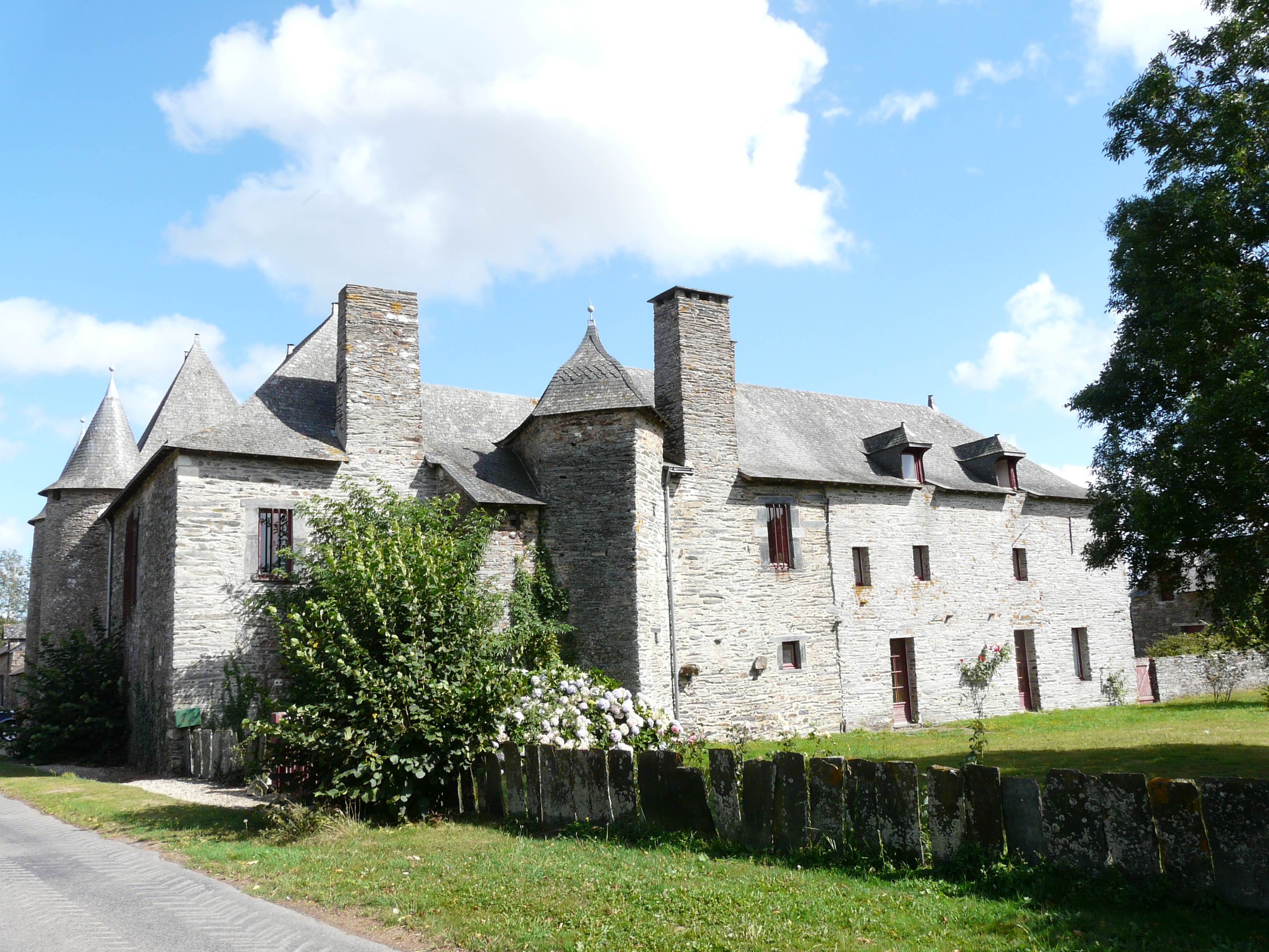 Ensemble du manoir de la Petite-Haie côté Ouest